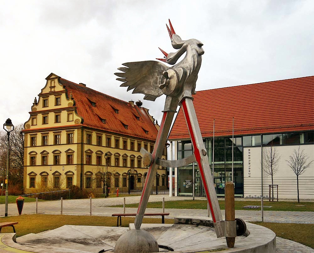 Schloßplatz Ichenhausen mit Blick auf das Schulmuseum und Schloß